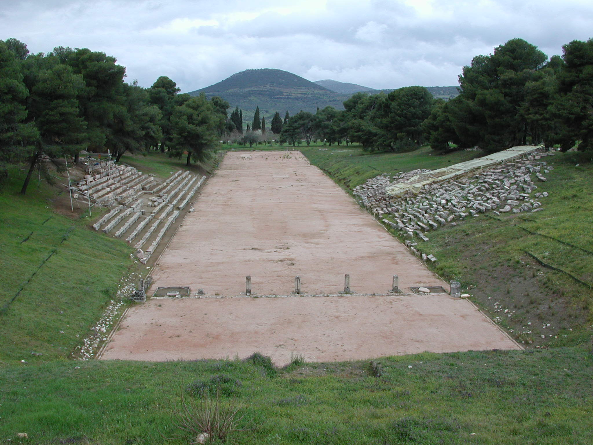 Stadion von Epidaurus